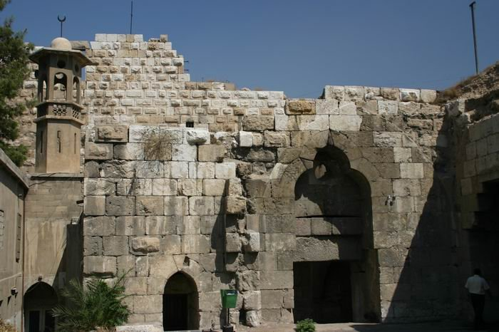 Zitadelle von Damaskus, eigenes Foto von 09/2006, public domain